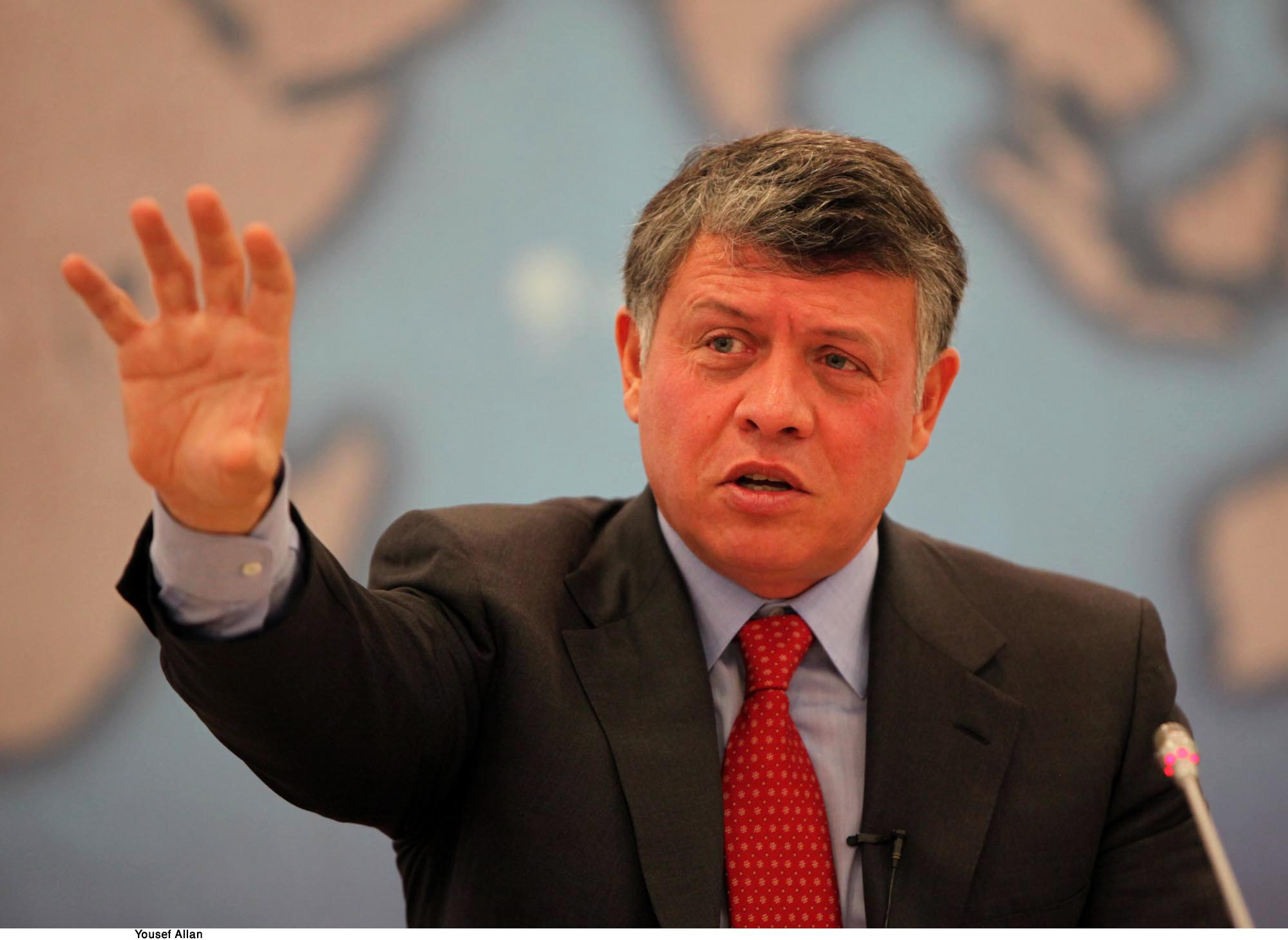 King Abdullah of Jordan